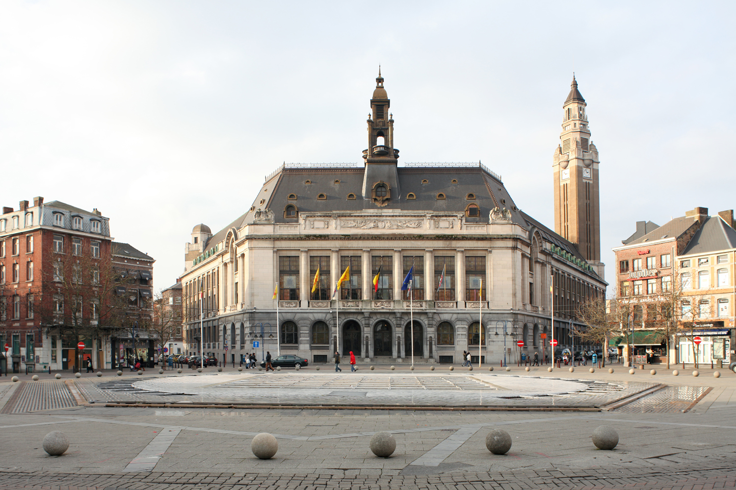 Hôtel de Ville de Charleroi sur la place Charles 2.